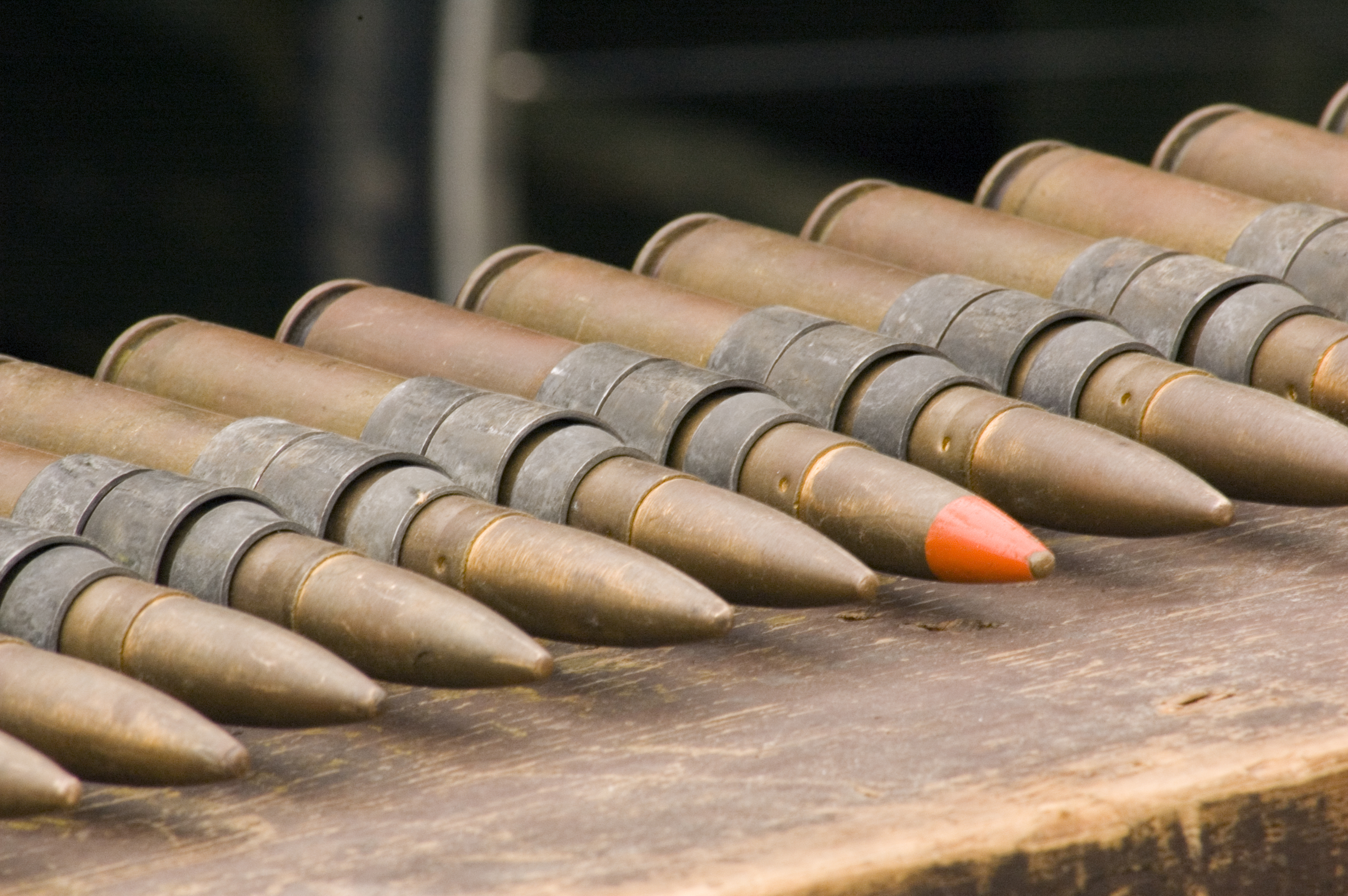 Belted .50 BMG